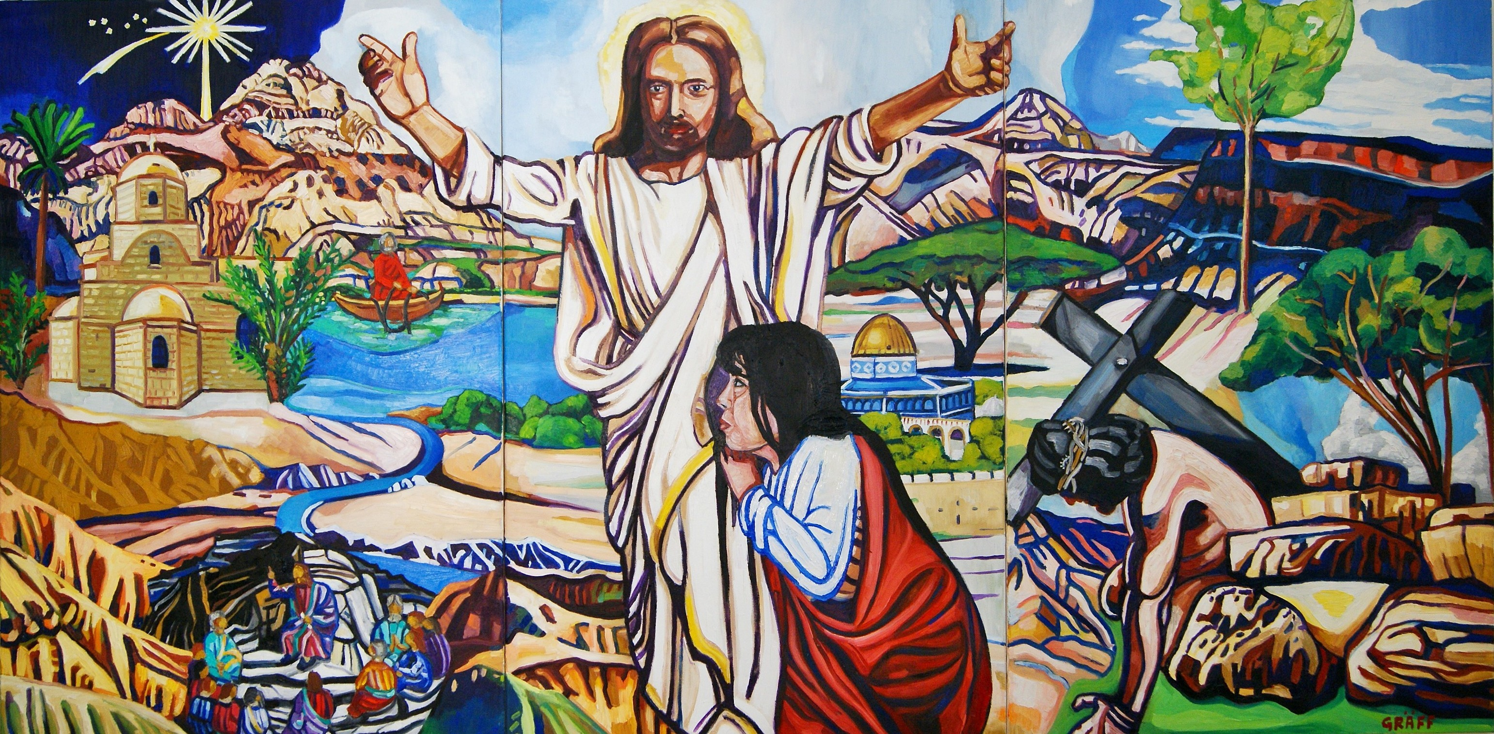 Matthias Laurenz Gräff, Ölgemälde "Jerusalem Triptychon", Öl auf Leinwand, 120x80 / 120x80 cm / 120x80 cm, 2016